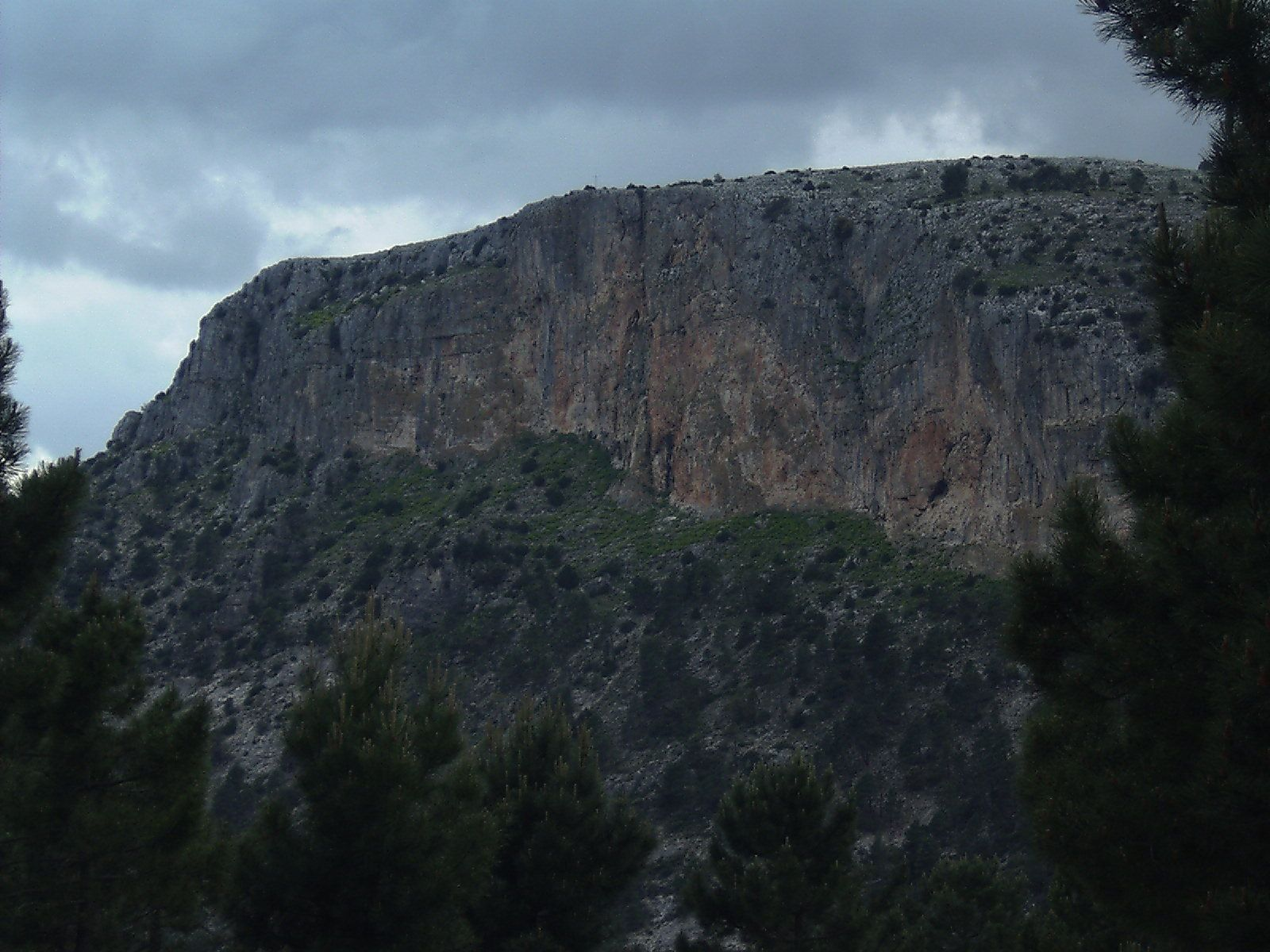 Caravaca de la Cruz, Murcia, España. Peña Rubia. -- Caravaca de la Cruz, Murcia, Spain. Mountain of the Peña Rubia (Pena Rubia, Peñarrubia, Peñarubia).